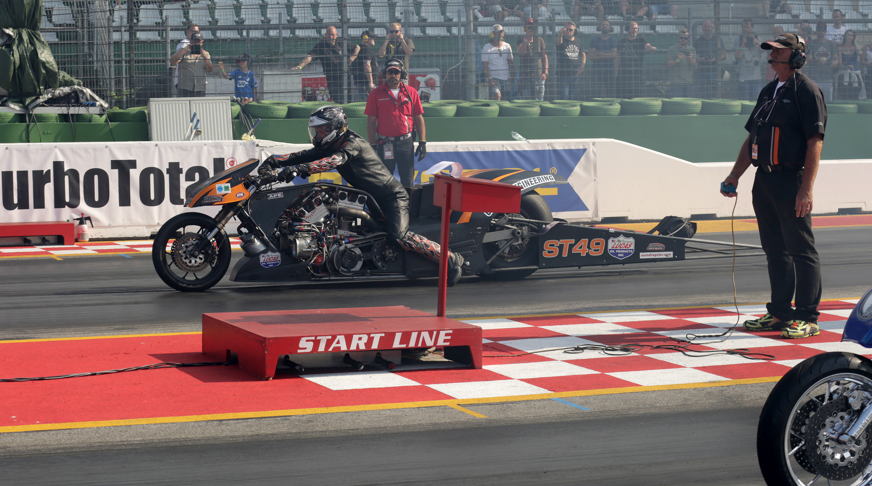 FIM / Super Twin Top Fuel / Rider: Neil Midgley (GBR) / NitrolympX 2019